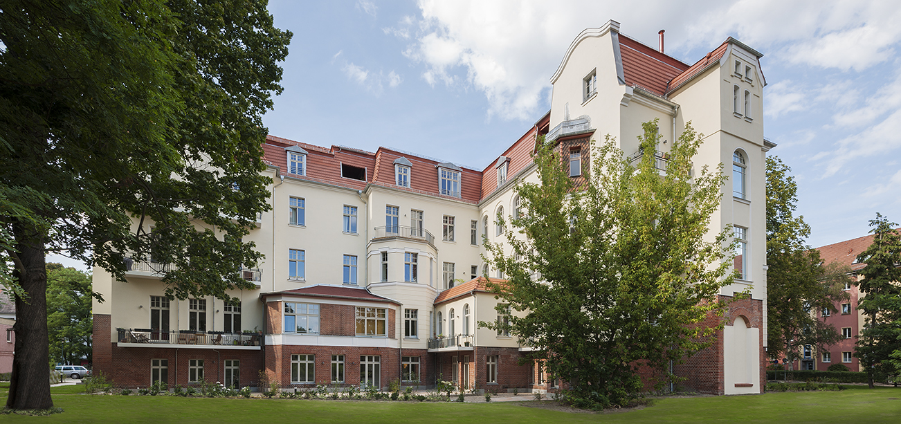 Berlin-Pankow, Parksanatorium. Ansicht nach Sanierung 2014.